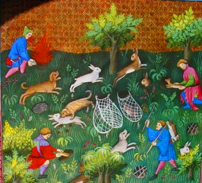 La Chasse au furet, Gaston Phoebus, 1387